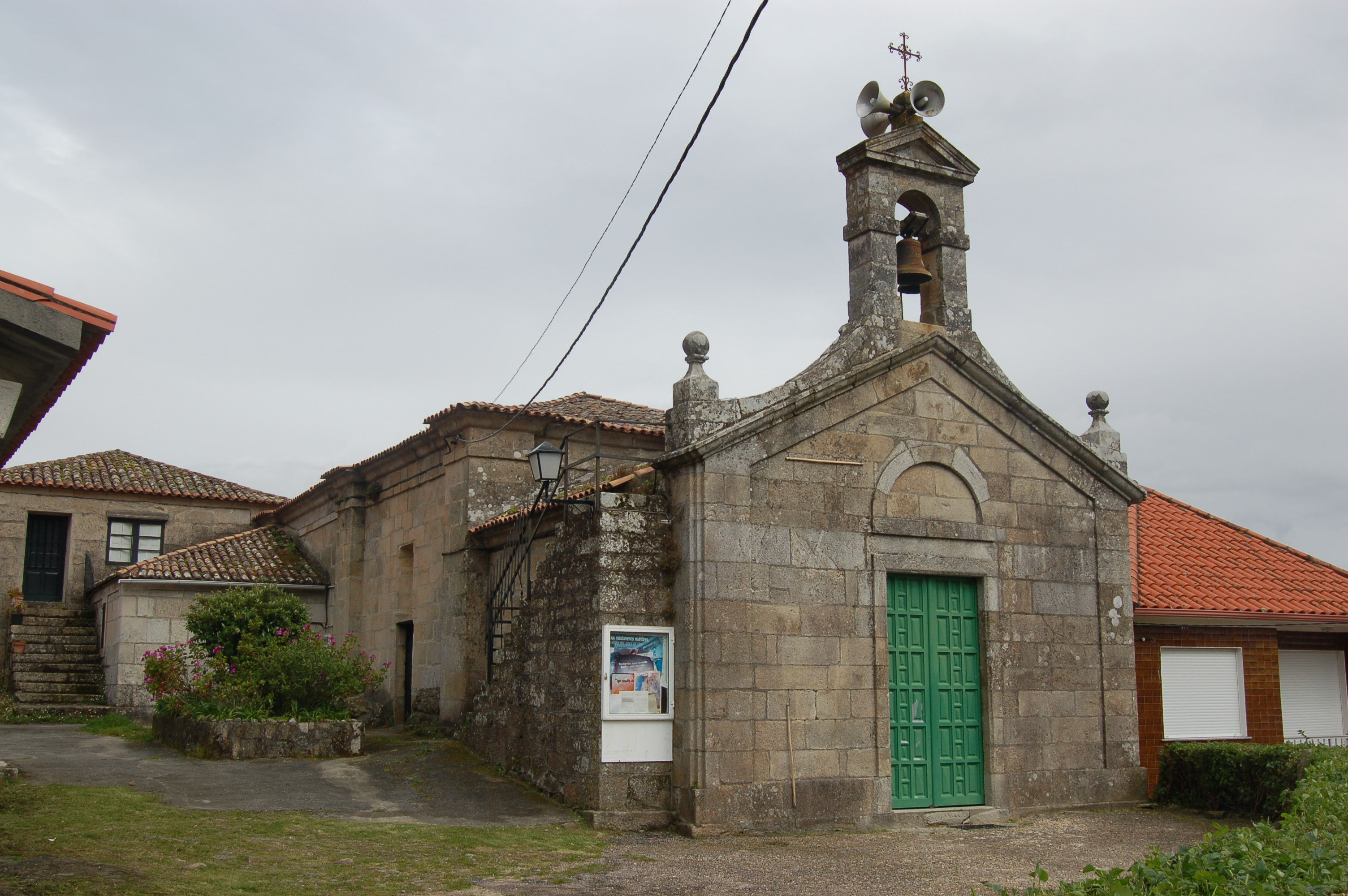 Igrexa parroquial de San Gregorio de Raxó (Poio)